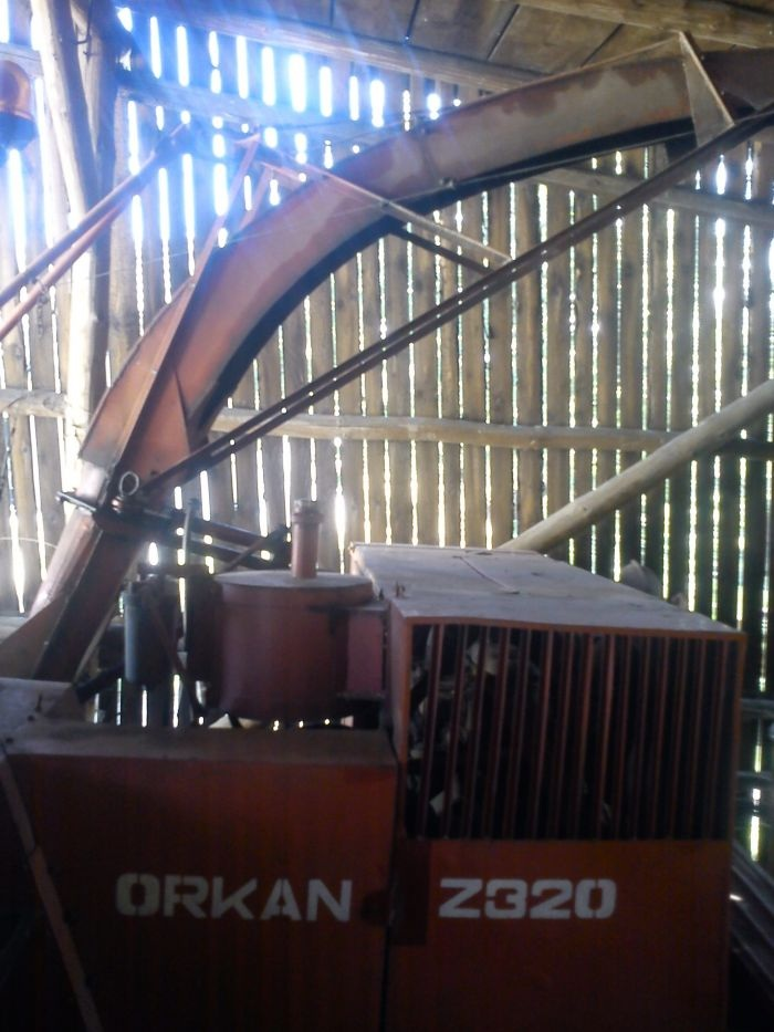 Orkan Z320 widoczny z lewej strony